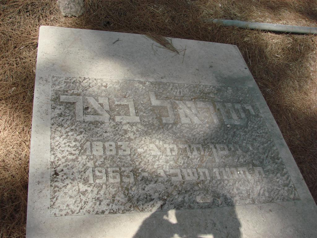 משה בצר